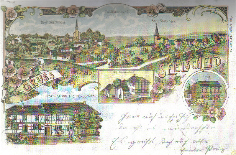 Postkarte mit Ansicht von Seelscheid (Neunkirchen-Seelscheid)